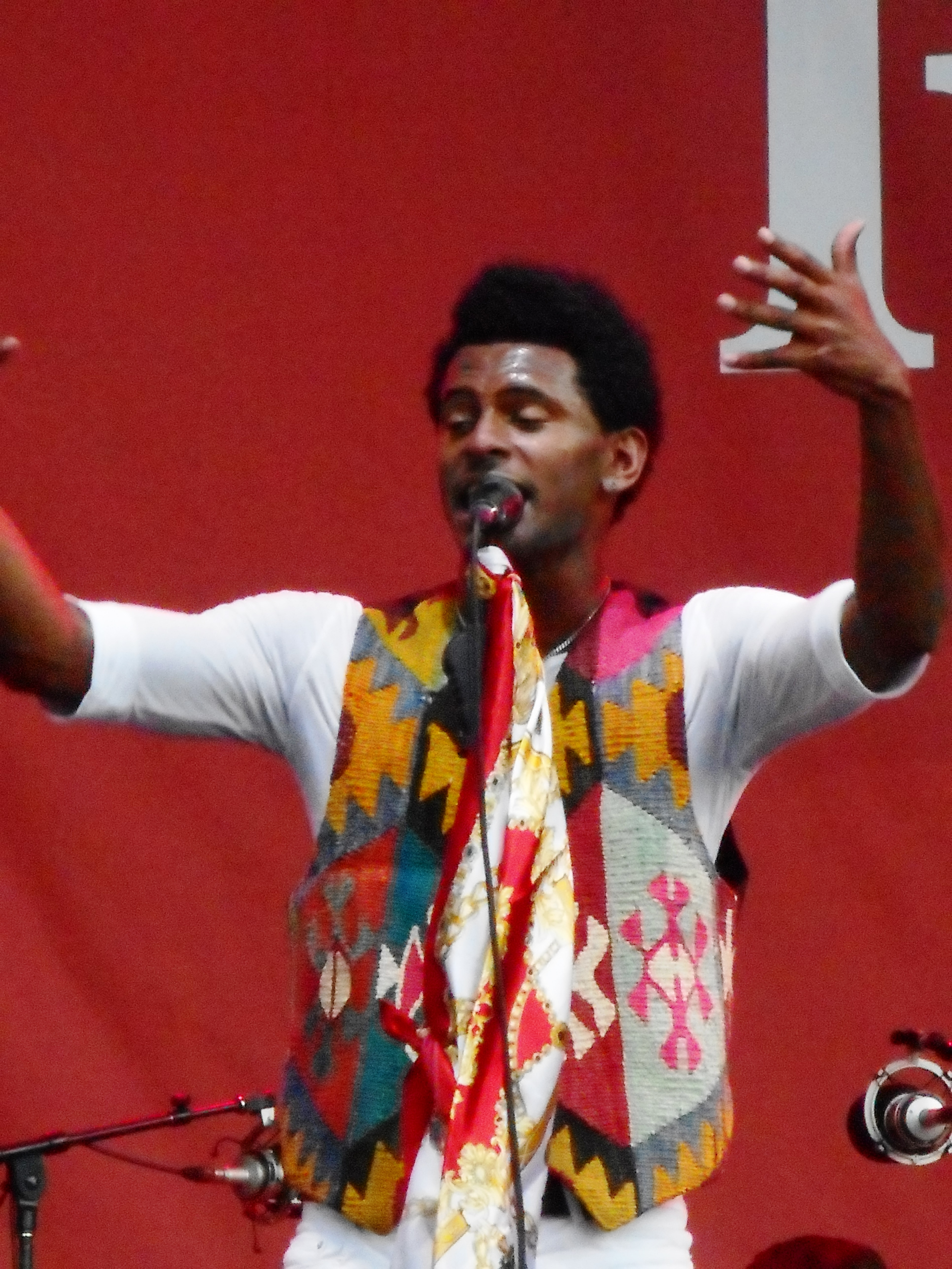 Spectacle de Con Brio, le 4 juillet 2016, rue Sainte-Catherine, dans le cadre du Festival international de jazz de Montréal